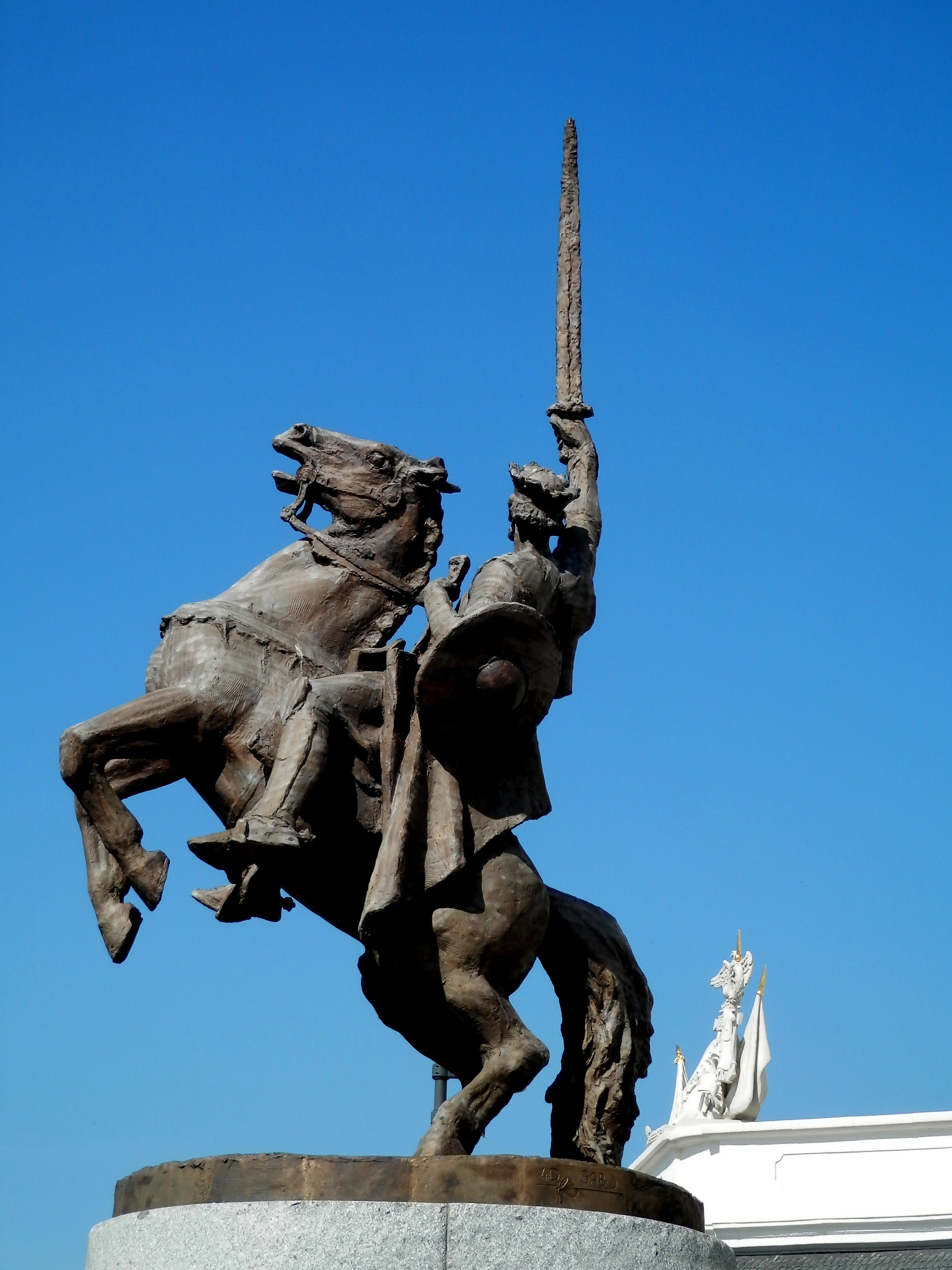 Socha Svätopluka. Bratislavský hrad.